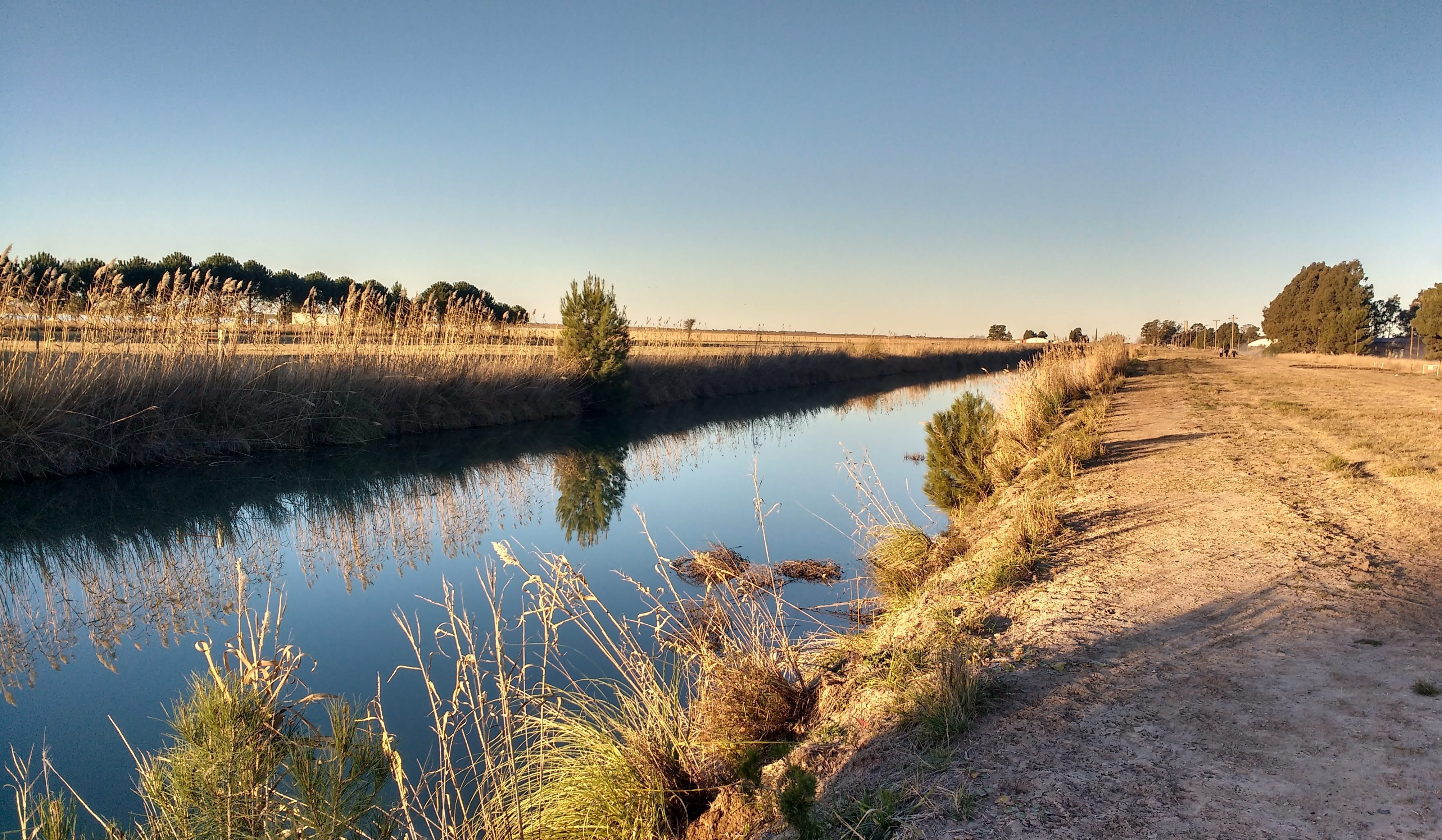 Las aguas del Río Colorado son derivadas al área de riego de Corfo (Corporación de Fomento del Valle Bonaerense del Río Colorado) por un sistema de tres tomas ubicadas a ambas márgenes del río, que abastecen a cinco canales de riego principales, uno de los cuales es el Canal Villalonga.